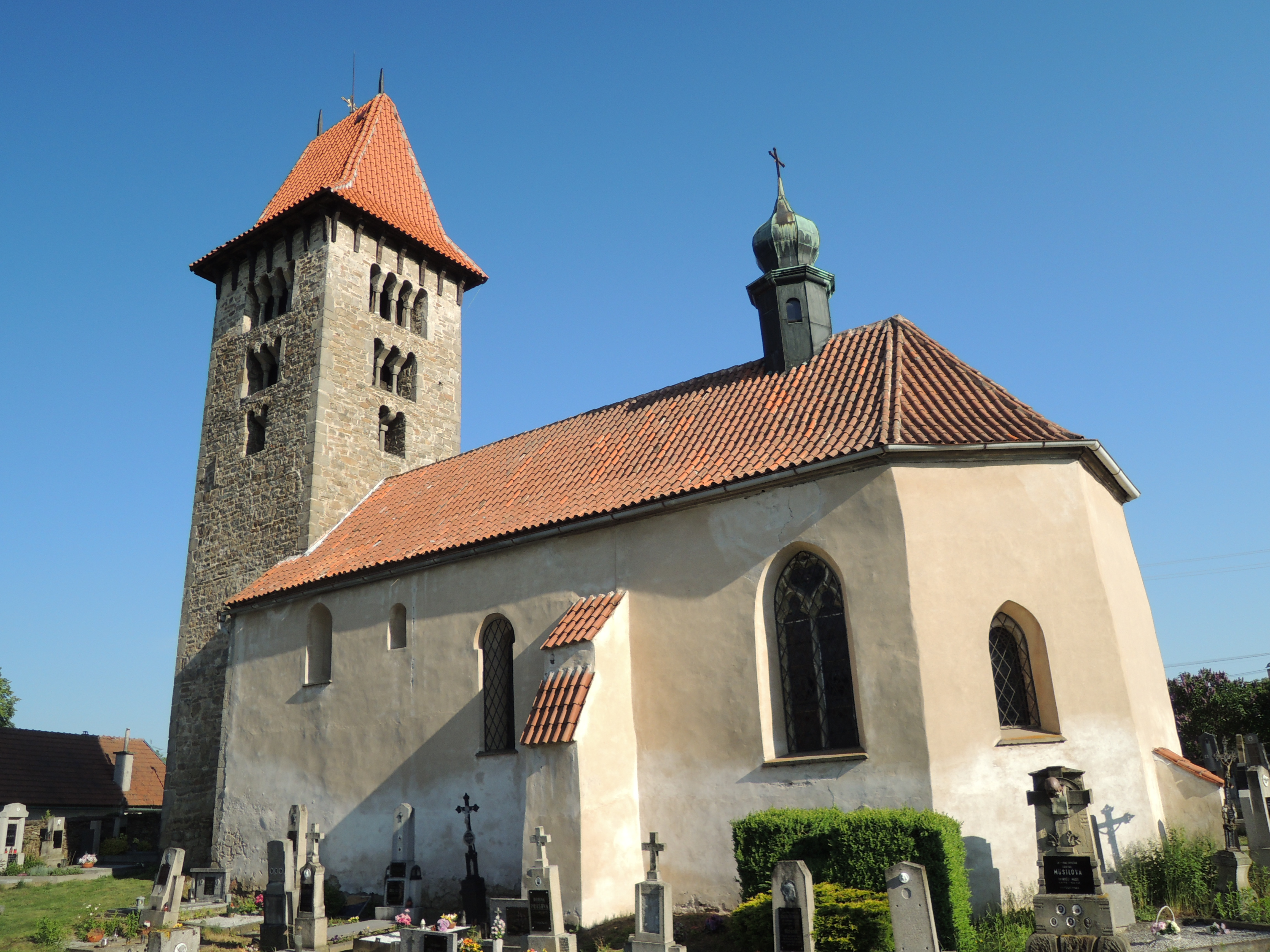 Jihovýchodní pohled na kostel sv. Václava, Chřenovice